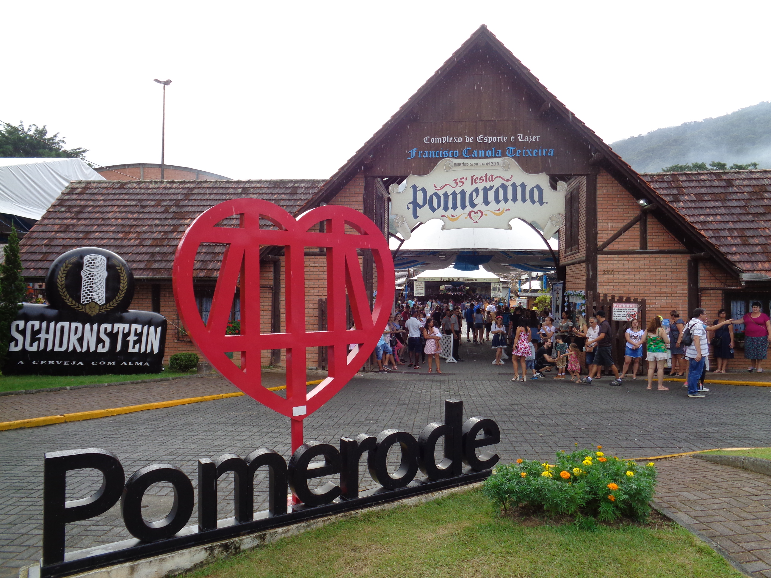 Entrada da trigésima quinta Festa Pomerana, em Pomerode, Santa Catarina.